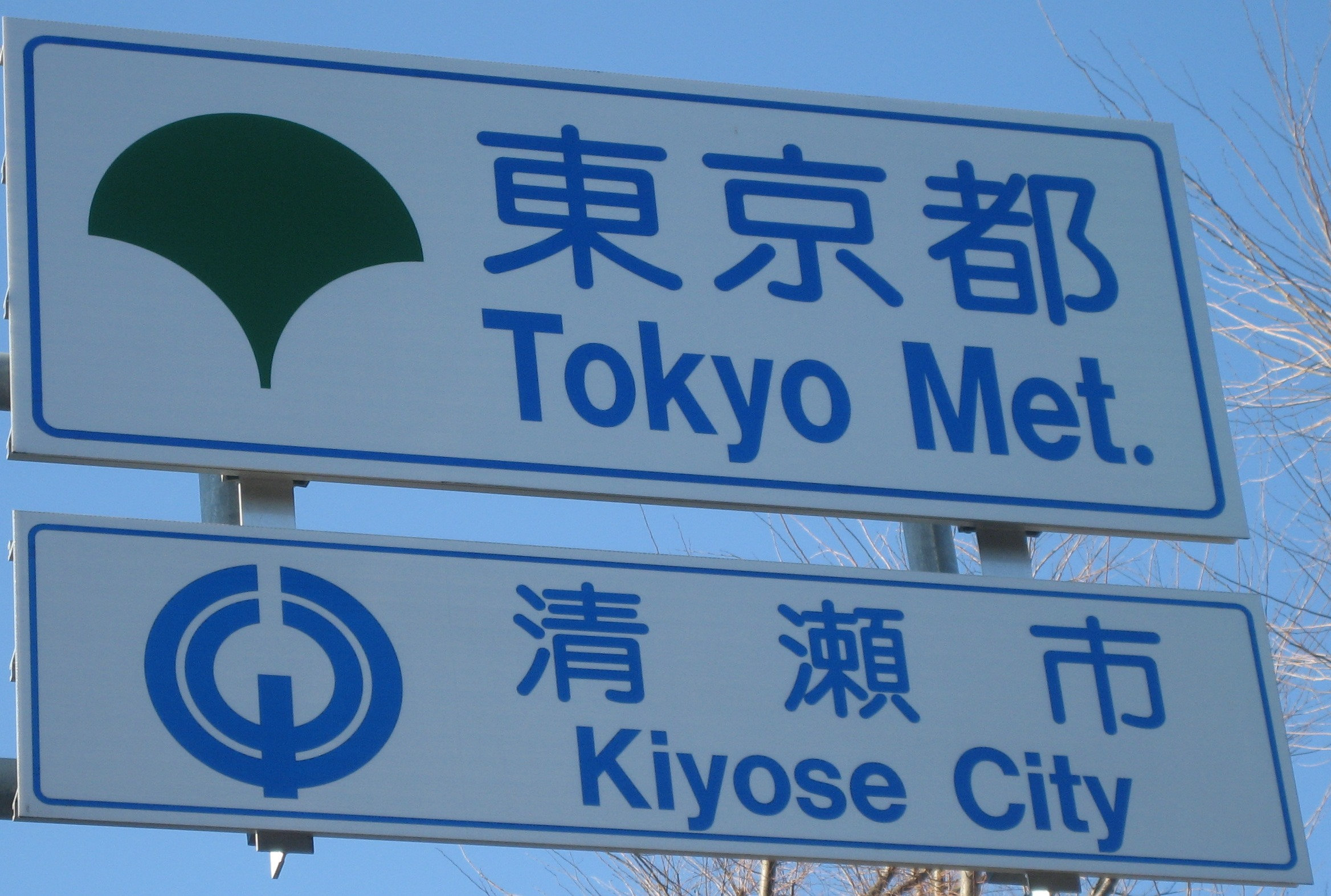 都道に設置されている東京都と清瀬市のカントリーサイン